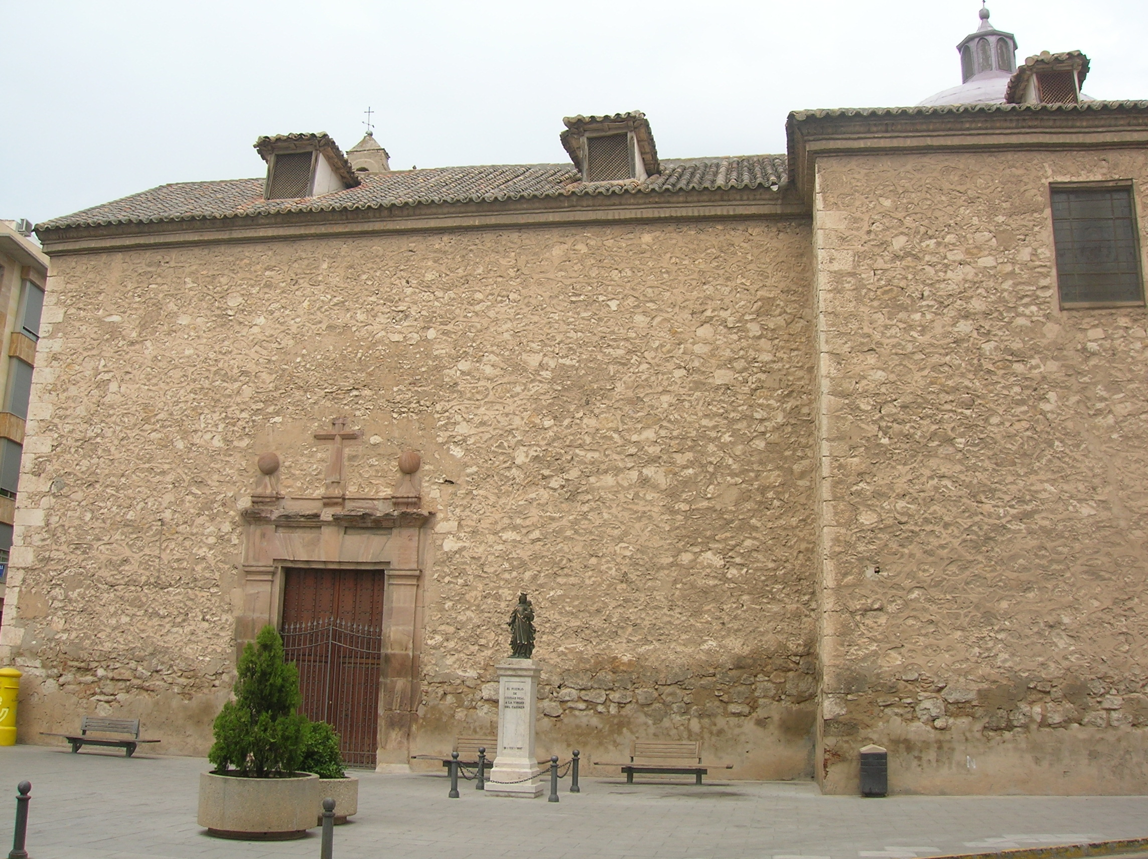 Monasterio Carmelitas de Ciudad Real